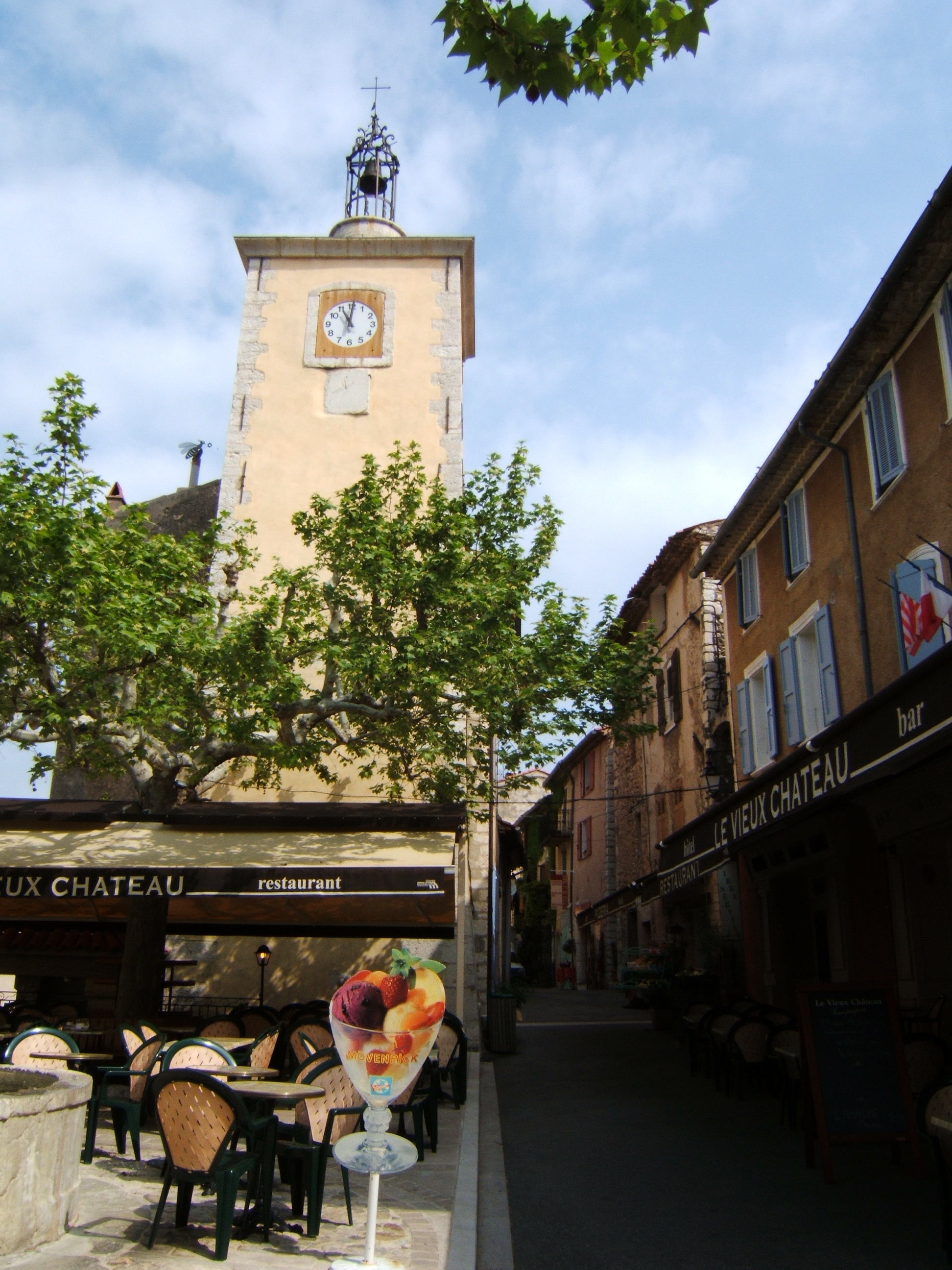 Le clocher d'Aiguines (Var), à l'ouest des gorges du Verdon.